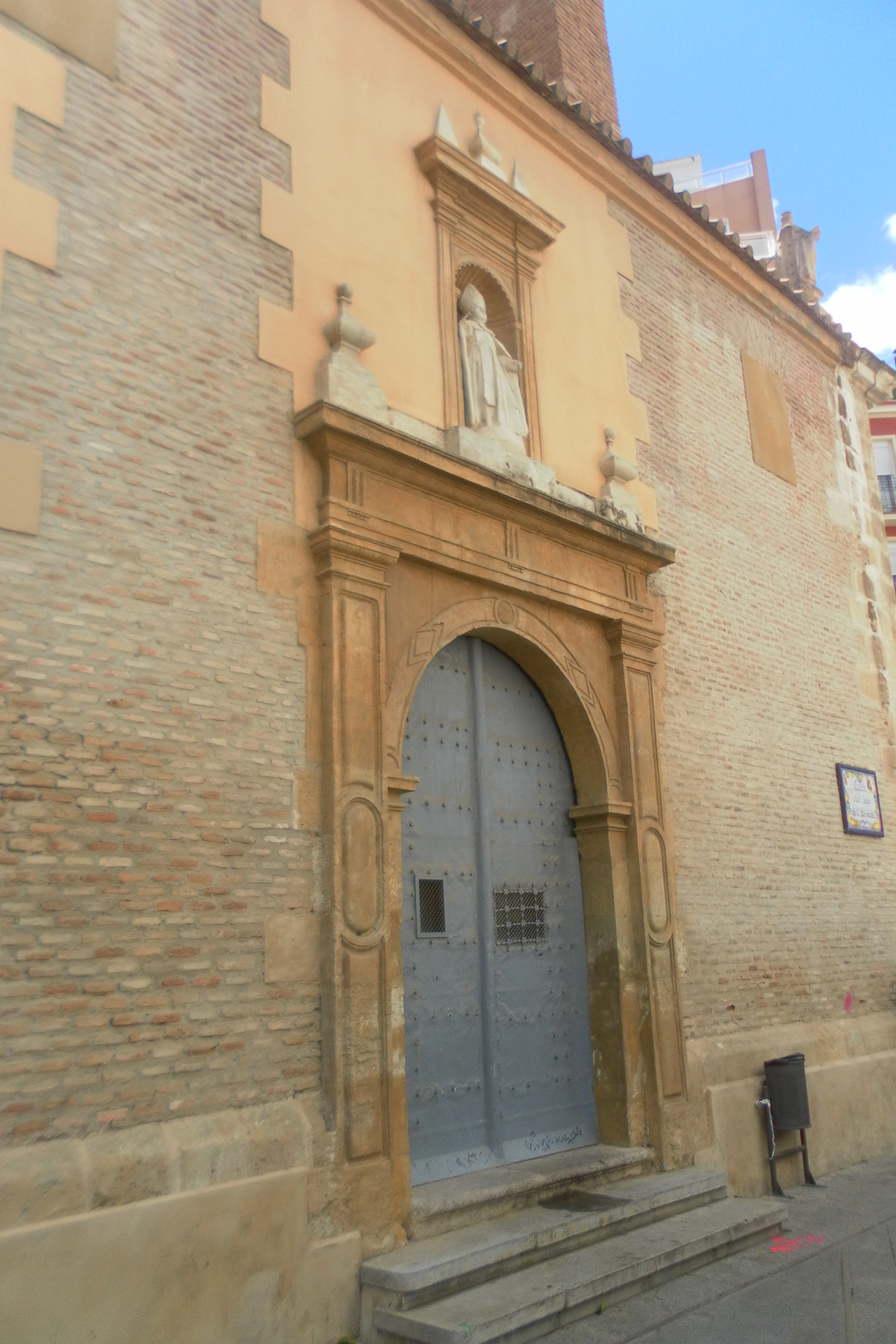 Portada lateral de la Iglesia parroquial de San Pedro de la ciudad de Murcia (Región de Murcia, España). Siglo XVII.